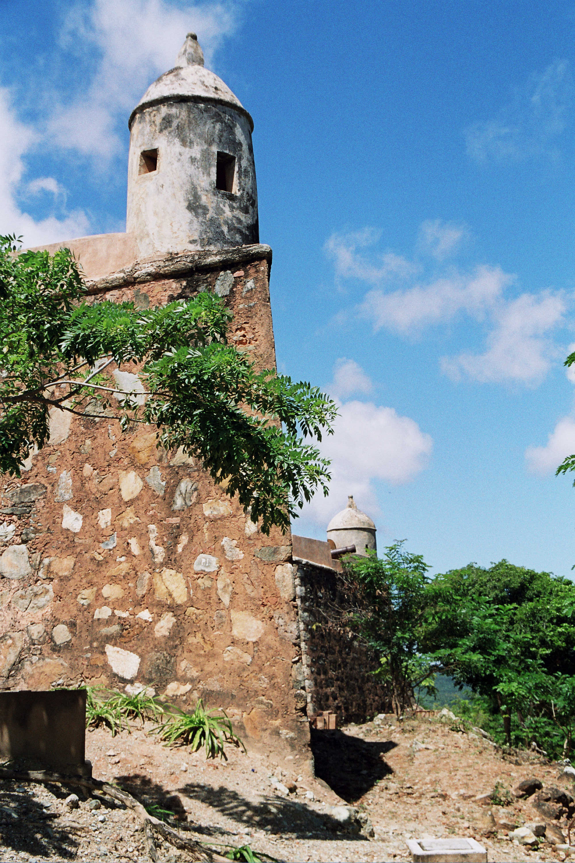 Bartizan de Castillo de Santa Rosa, isla de Margarita, Venezuela.